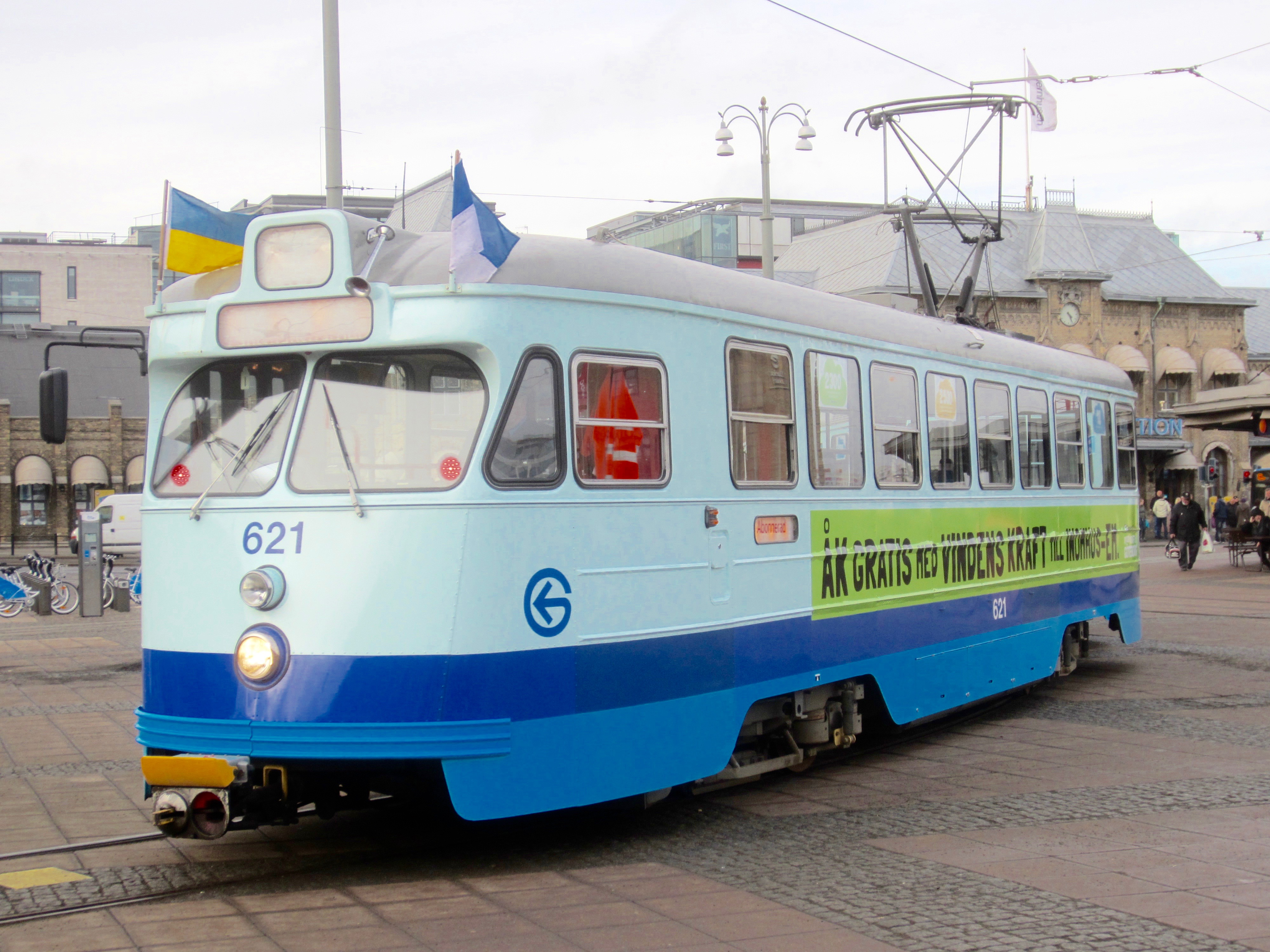 Spårvagn 621(M25) vid Drottningtorget i Göteborg 2013.